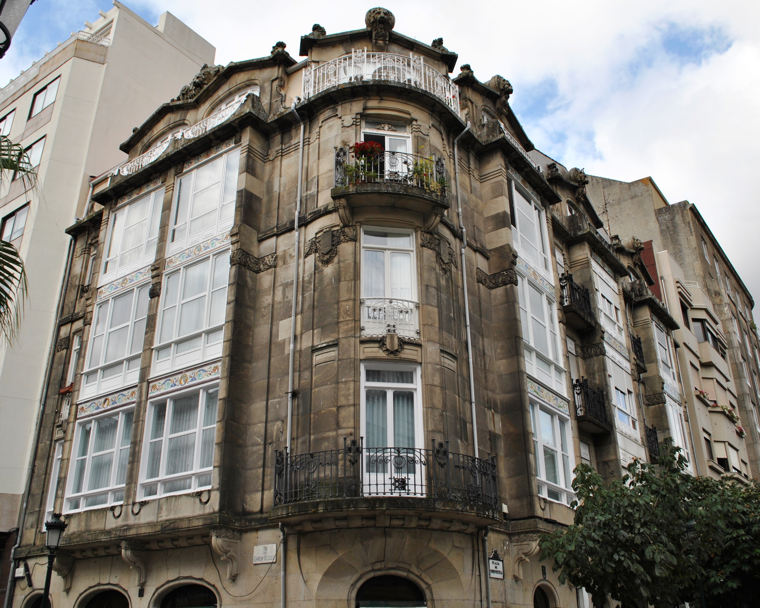 Vexa o título e as categorías.